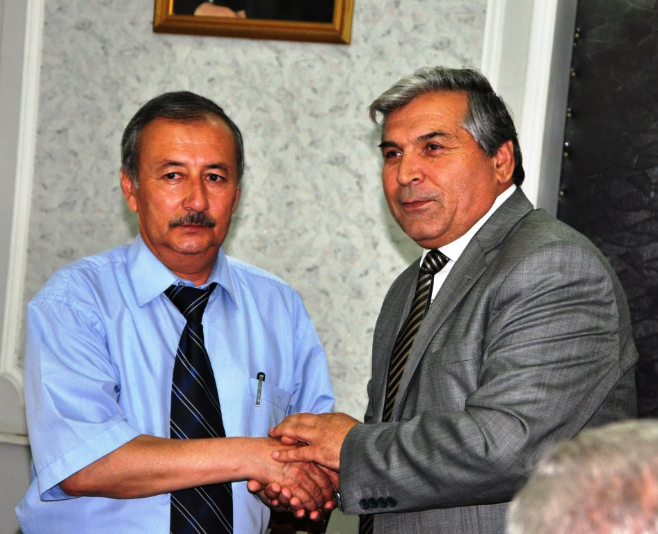 Зав. кафедрой Института повыш. квал. высш образов учреждений РТ при Тадж. национ. университете Саъдиев Ш. и Проректор по учебной работе ХГУ им. Б. Гафурова Рахимов А. во время церемонии вручения дипломов слушателям курсов повышения квал. (ХГУ им. Б. Гафурова , г. Худжанд, май 2013г.)Тоҷикӣ: Мудири каф. Донишк.такм.ихтисоси ОМТОК назди Дониш. миллии Тоҷик. Саъдиев Ш. ва ноибректор оид ба кори таълимии ДДХ ба номи акал Б.Ғафурова Раҳимов А. дар чорабинии супоридани гувоҳномаҳо ба шунавандагони курсҳои такм. ихтисос дар ДДХ ба номи Б. Ғафуров (ДДХ ба номи акад Б. Ғафуров, ш. Хуҷанд, май с. 2013)